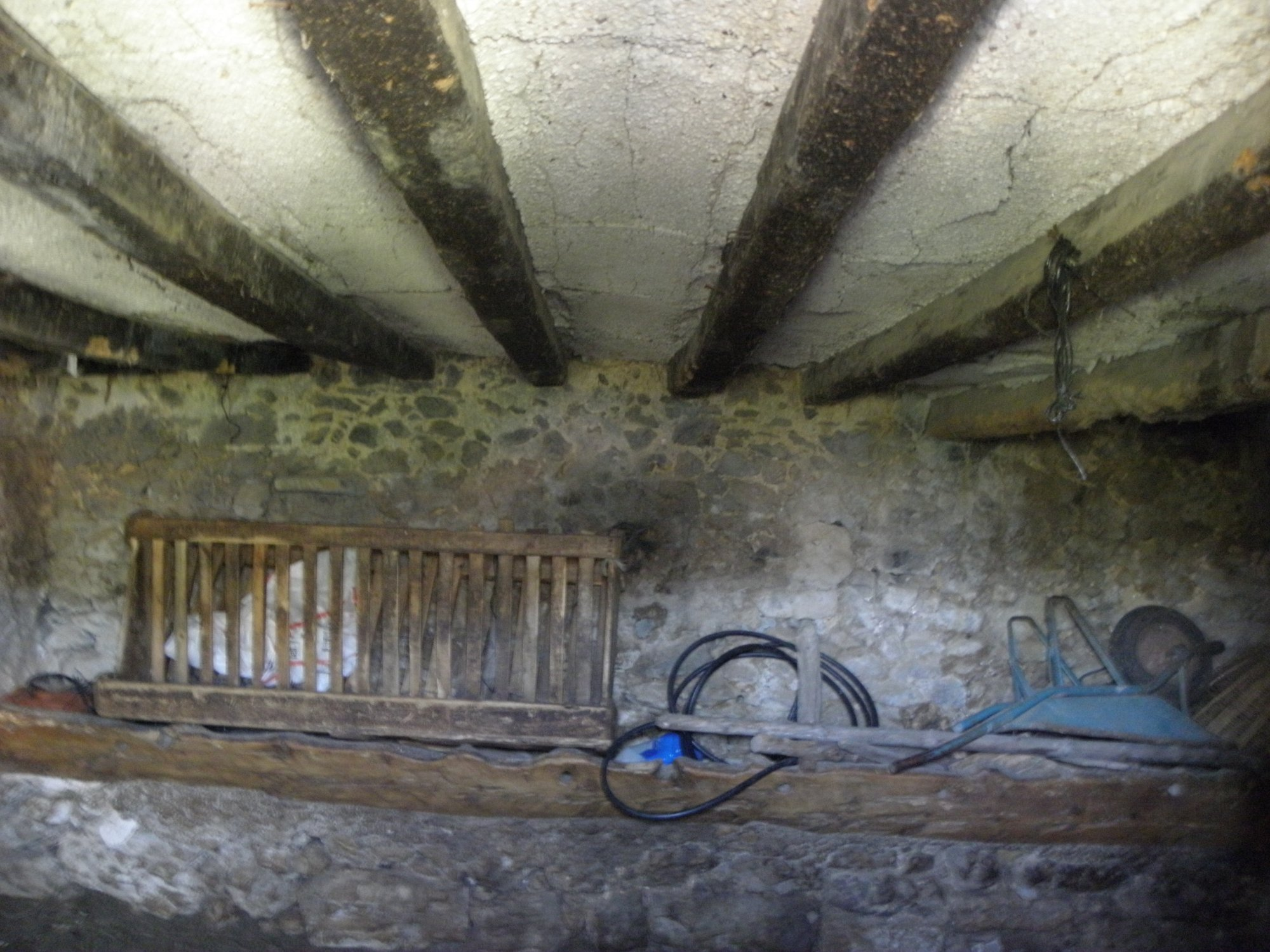 La masia de Cal Culrodó, al poble de la Coma (municipi de la Coma i la Pedra, Vall de Lord, Solsonès) L'entrada